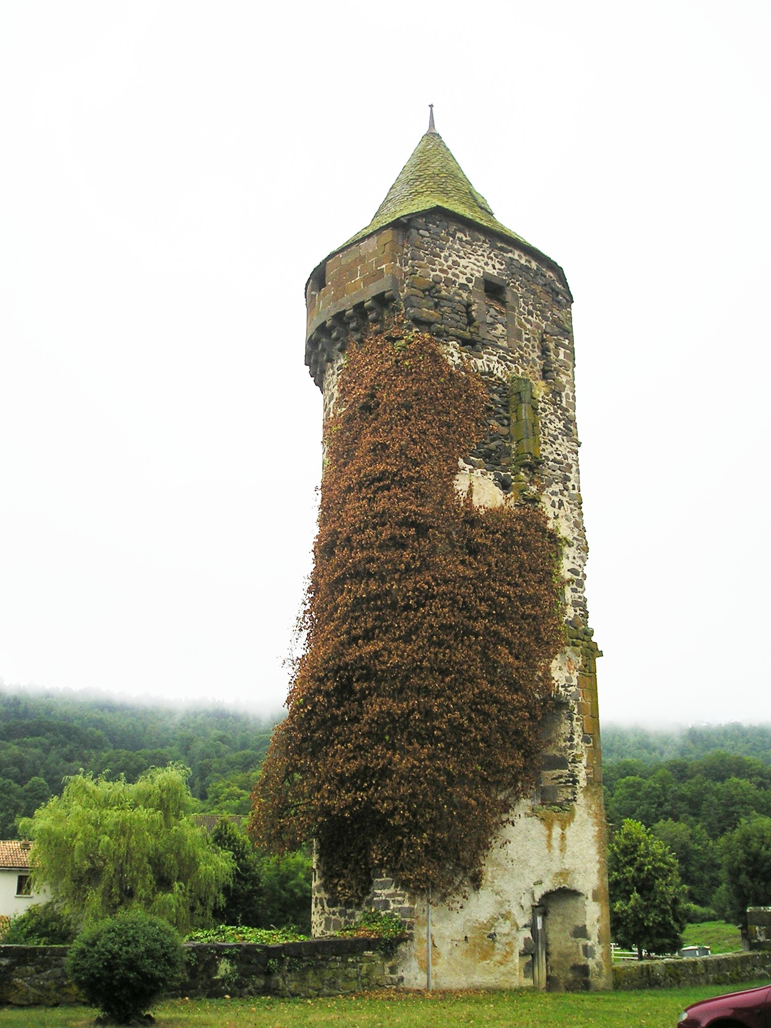 Schlossturm_von_Roffiac_bei_Saint-Flour